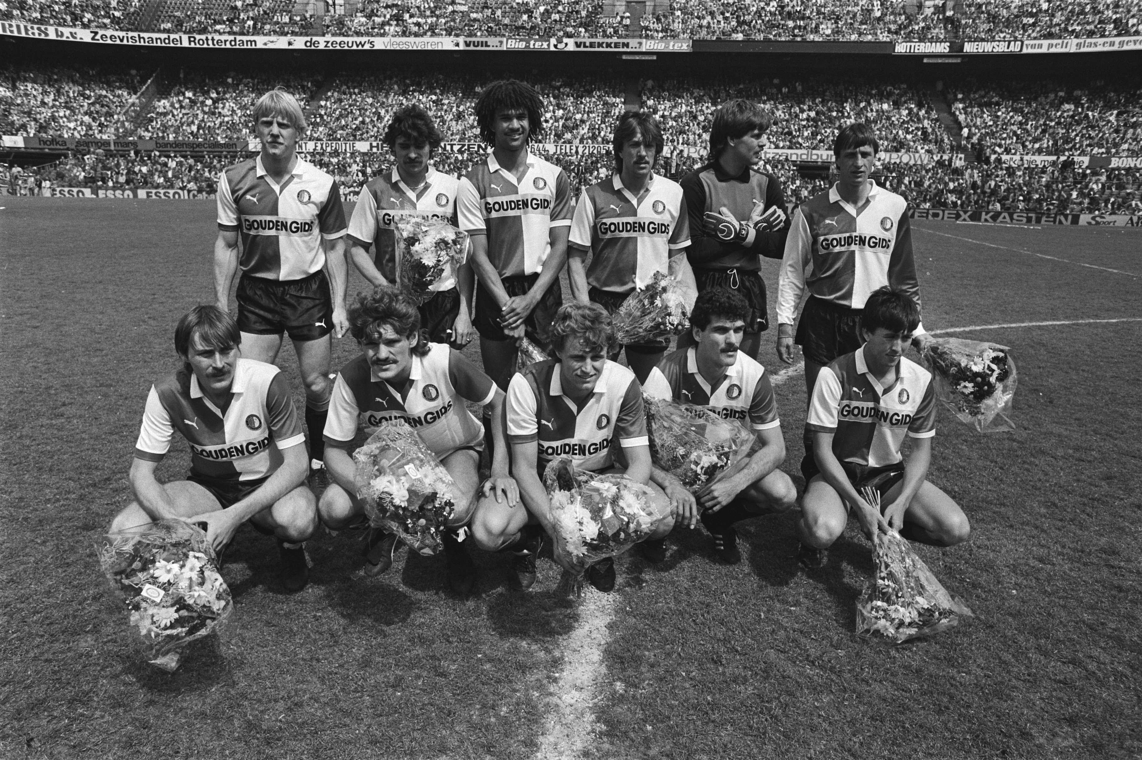 Feyenoord tegen PEC, met afscheid Johan Cruijff ; elftalfoto. Staande, van links naar rechts: André Hoekstra, André Stafleu, Ruud Gullit, Ben Wijnstekers, Joop Hiele, Johan Cruyff. Voorste rij, van links naar rechts: Ivan Nielsen, Henk Duut, Peter Houtman, Michel van de Korput, Stanley Brard.